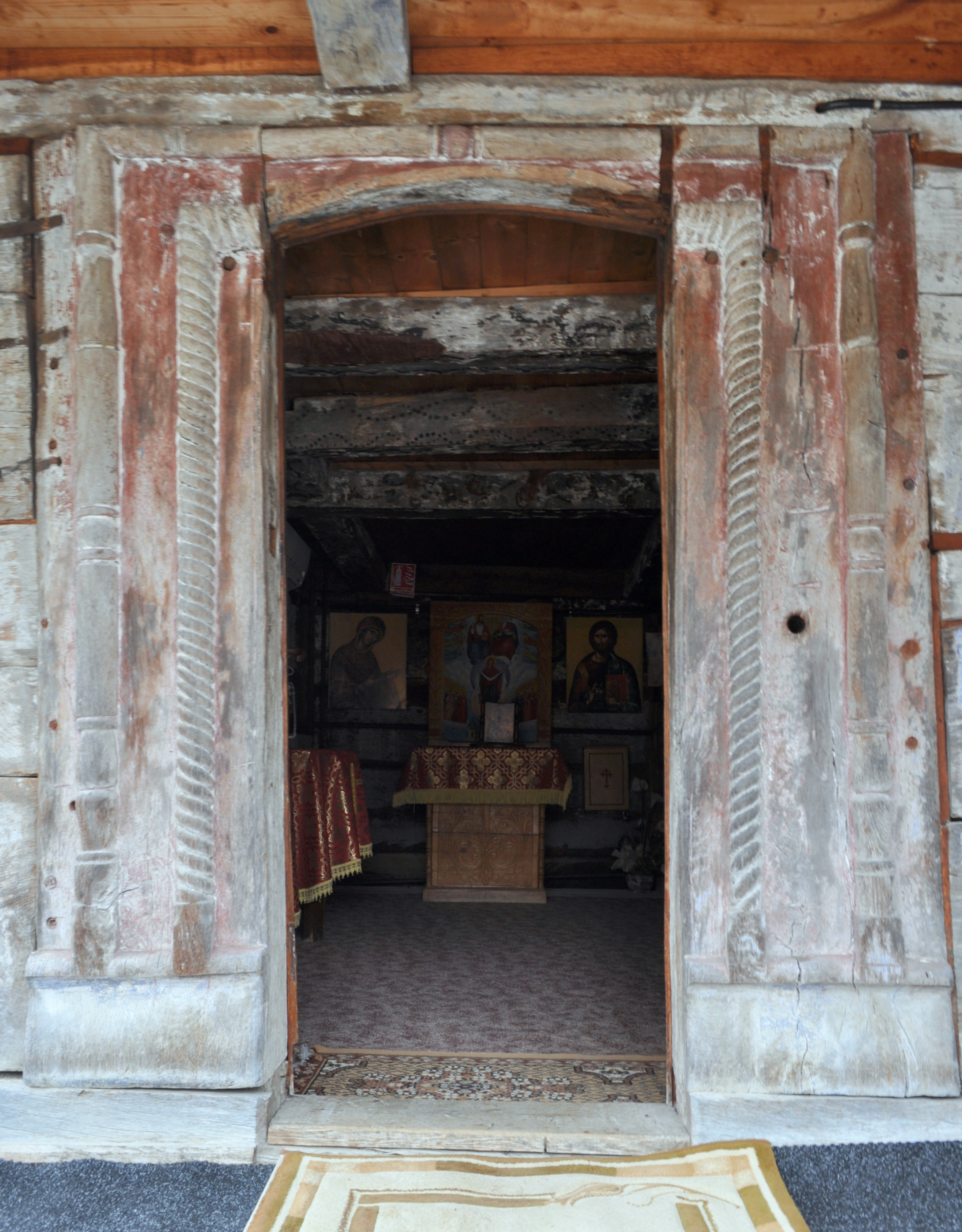 Biserica de lemn "Adormirea Maicii Domnului" a mănăstirii Bic, strămutată din satul Stâna